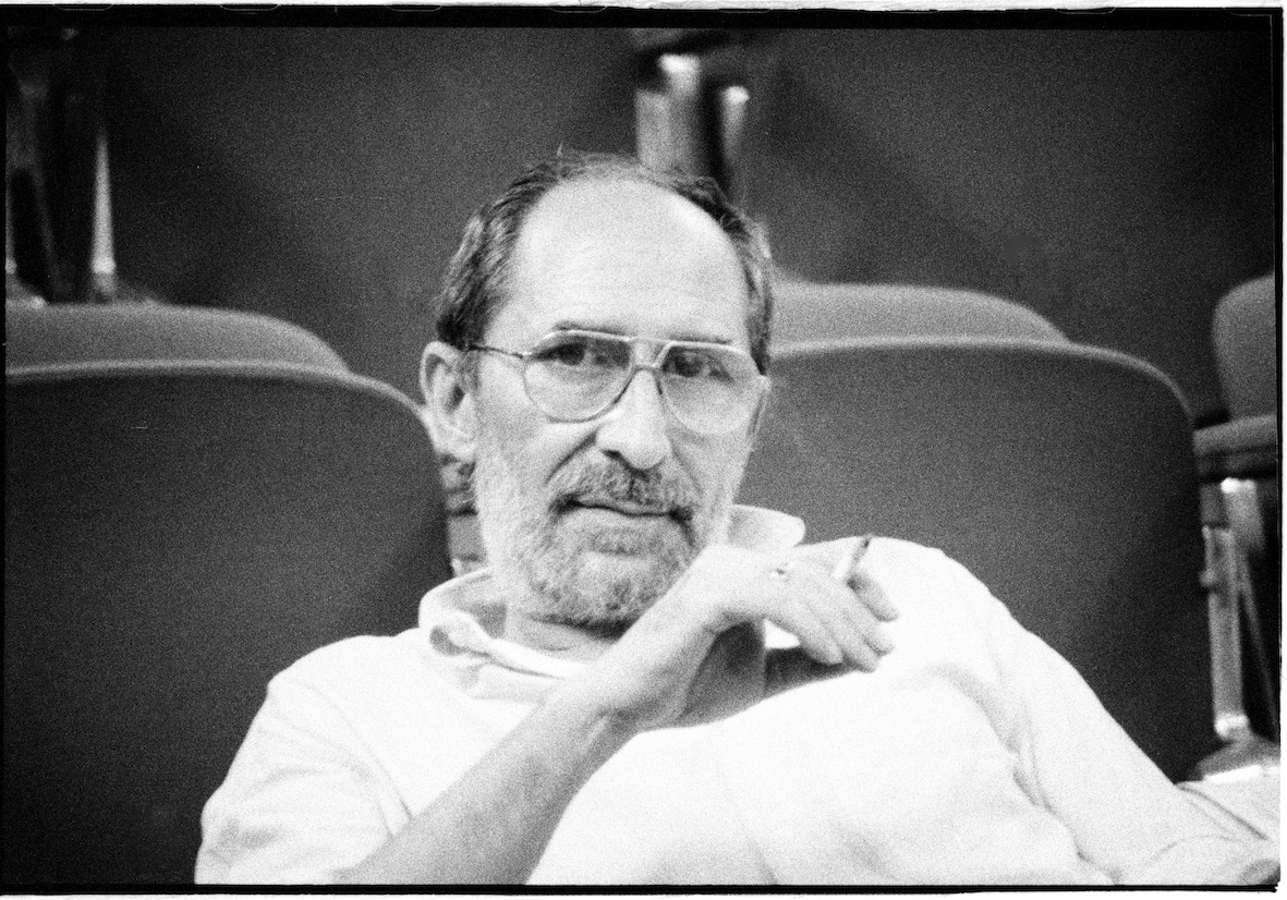 Arnaldo Picchi